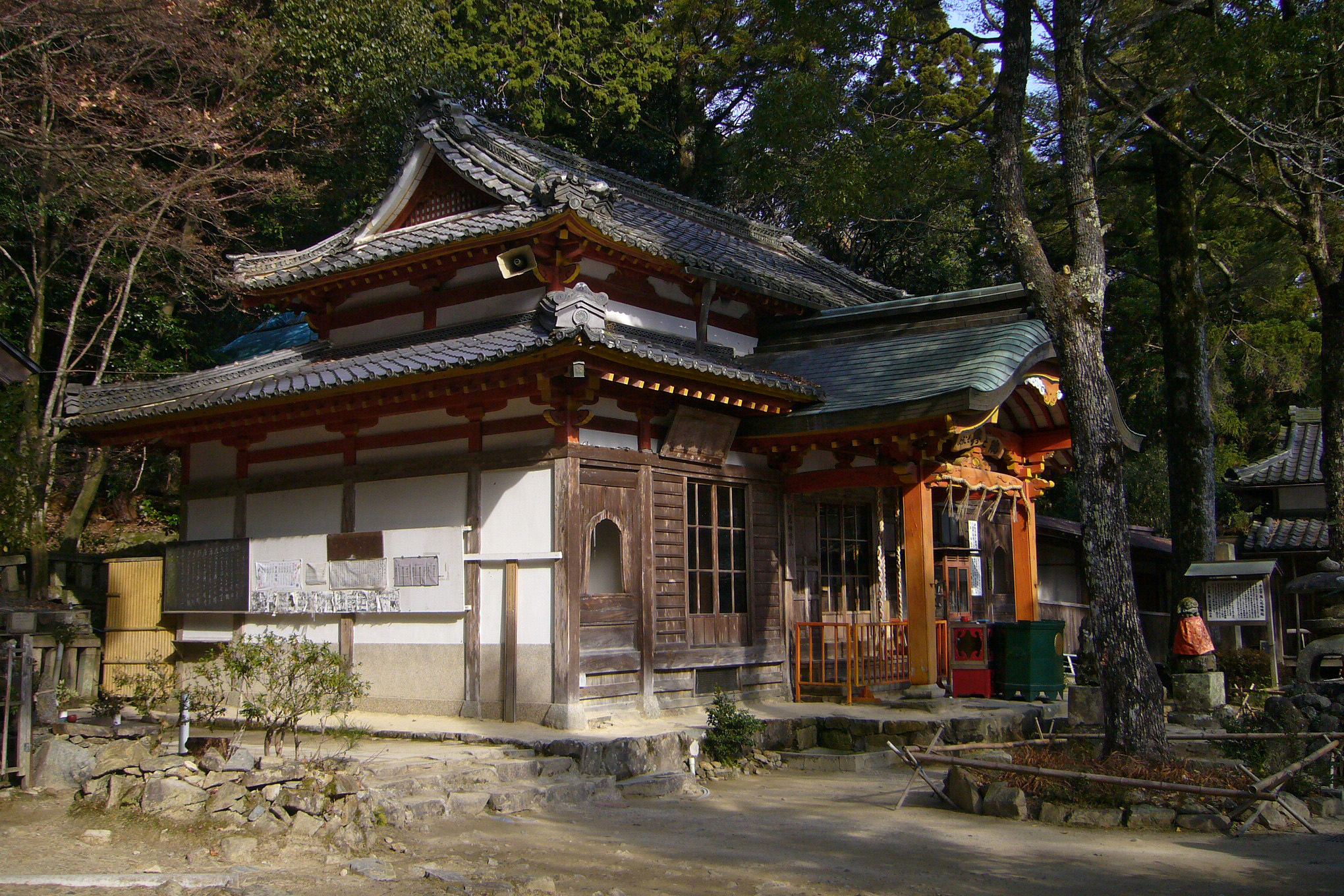 Nakayamadera in Takarazuka, Hyogo prefecture, Japan